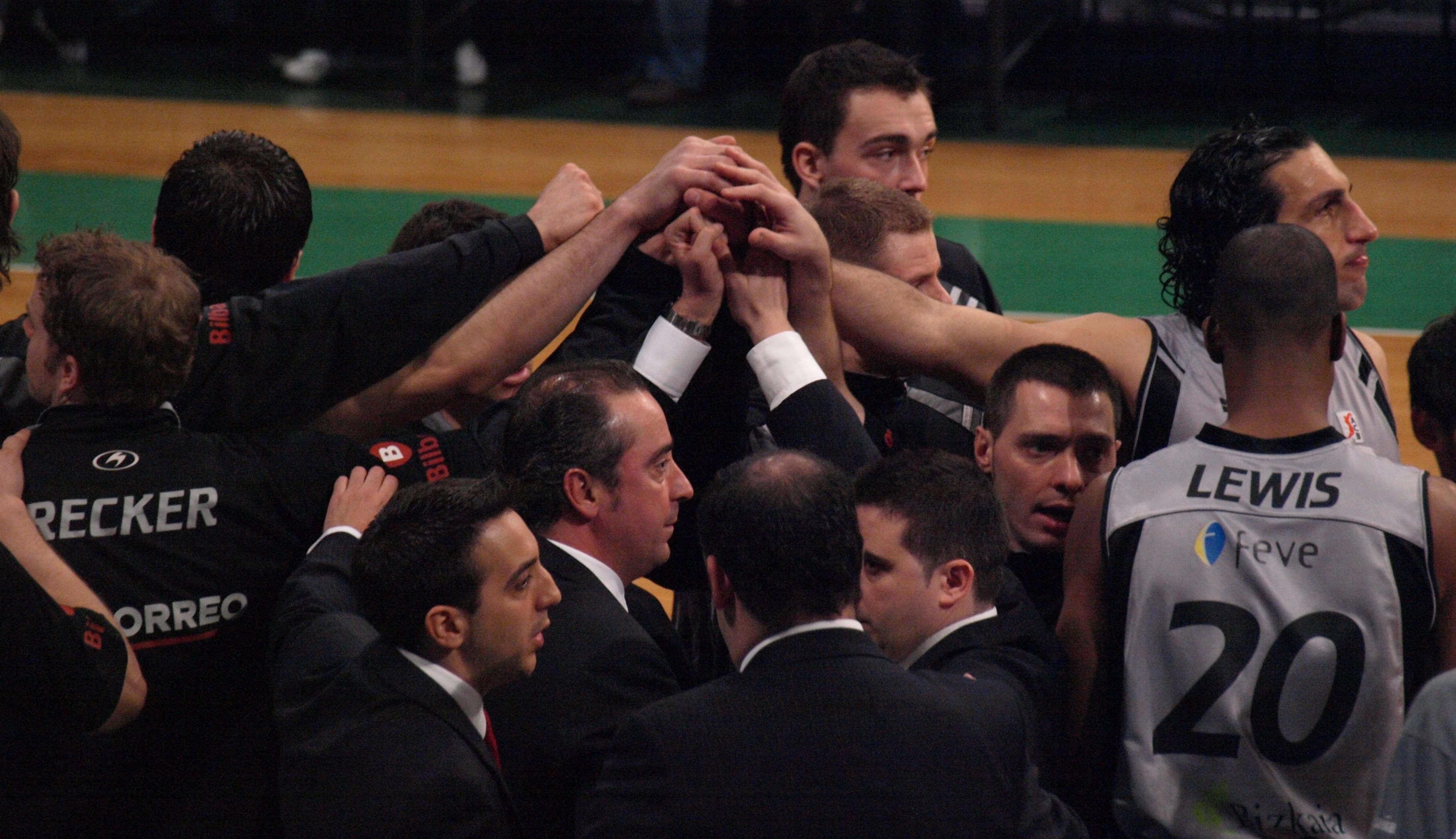 Plantilla y cuerpo técnico del Iurbentia Bilbao en un momento del partido que les enfrentó al Joventut de Badalona correspondiente a la liga ACB 2008/09 disputado en el Olímpico de Badalona.